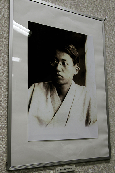 八女市立図書館2階にある山本健吉の写真